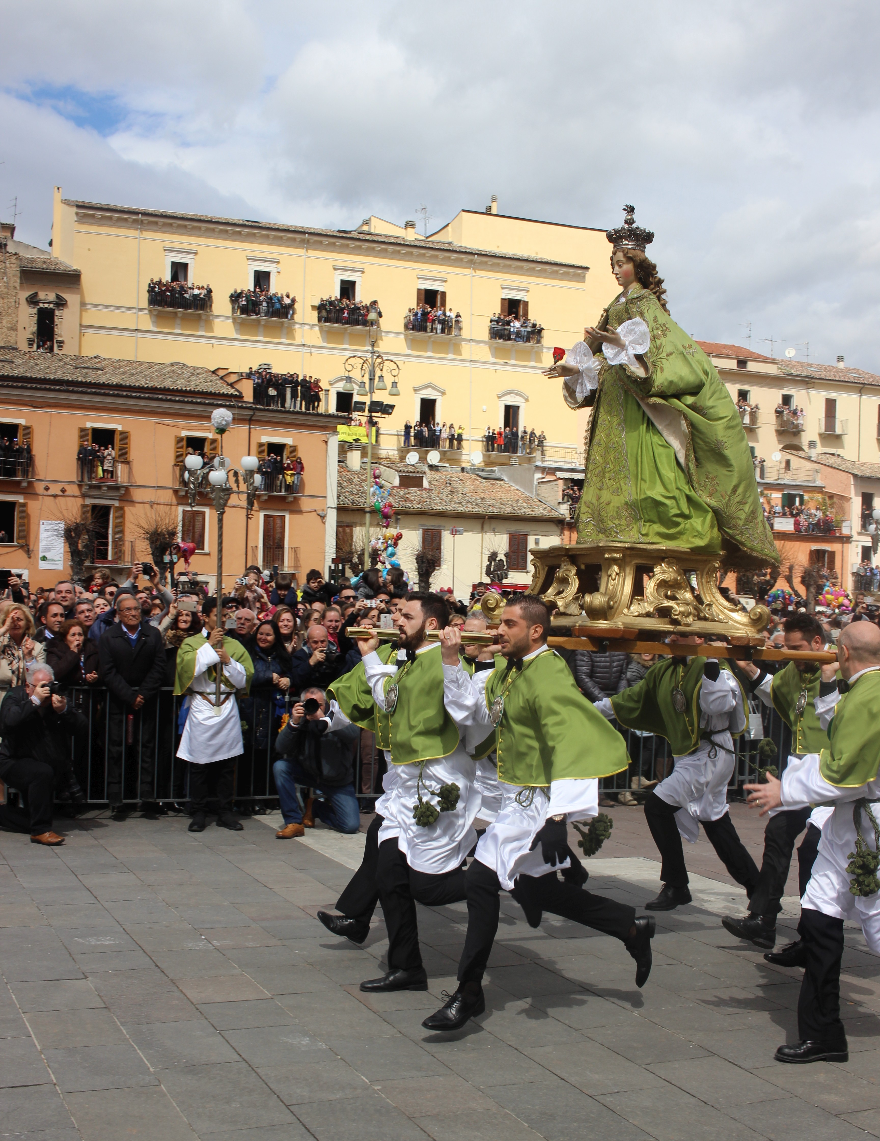 La madonna che scappa in piazza 2018